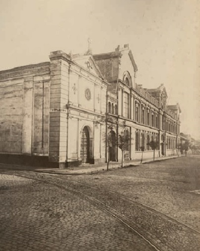 Casa Central de la Universidad de Chile durante el siglo XIX. En primer plano la capilla de San Diego y la antigua biblioteca del Instituto Nacional